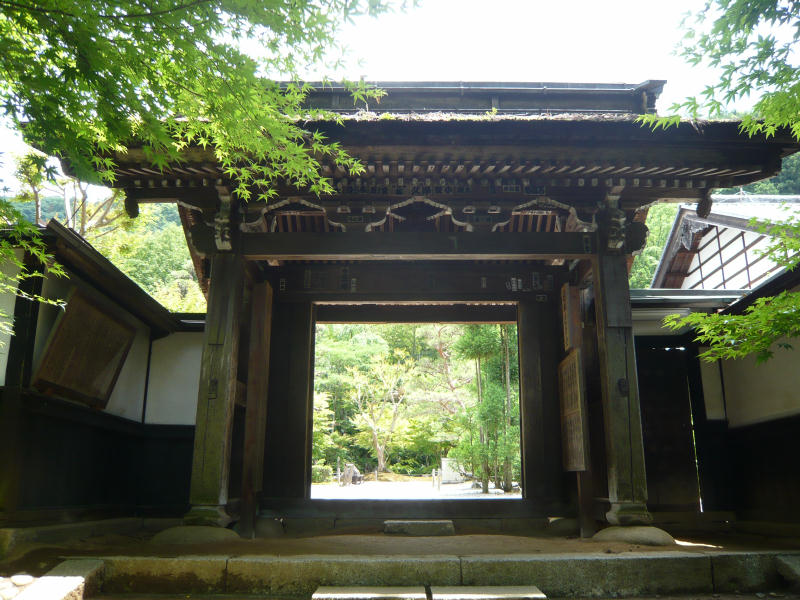 定勝寺山門